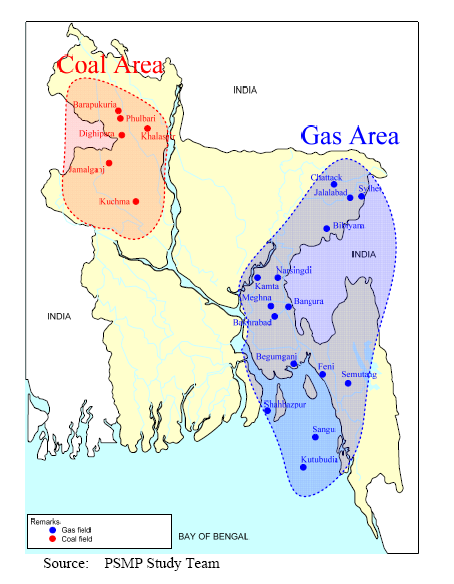 বাংলাদেশের কয়লা ও গ্যাস ফিল্ড।